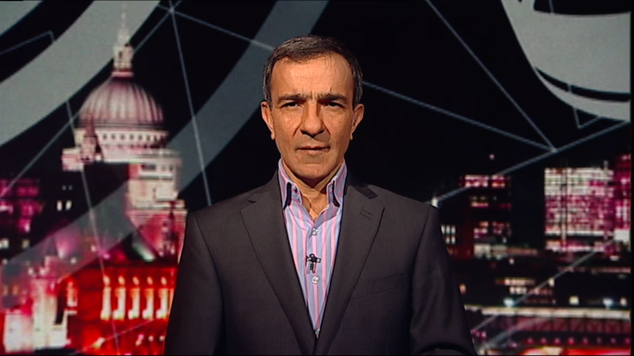 داریوش کریمی در برنامه‌ی پرگار بی‌بی‌سی فارسی